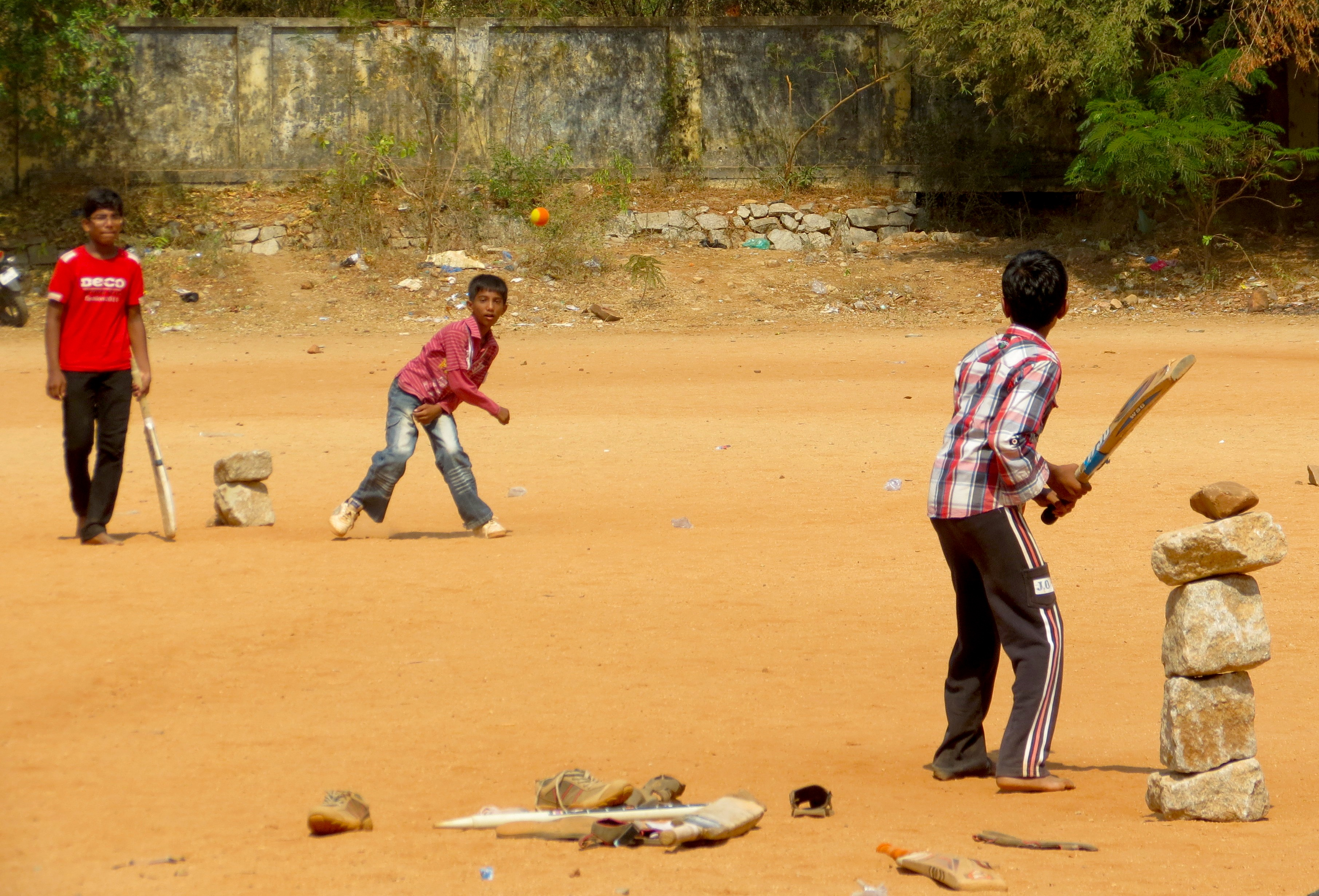 Cricket in Hyderabad, Telangana.